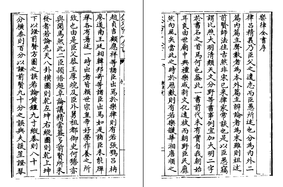 乐律全书序